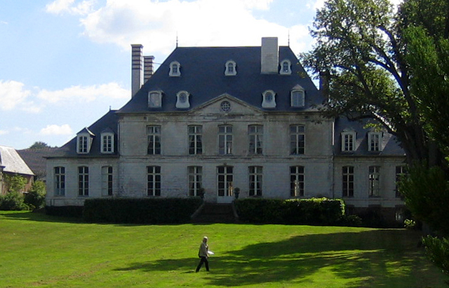 Creuse (Somme, France) - Le château (façade donnant sur le parc). .